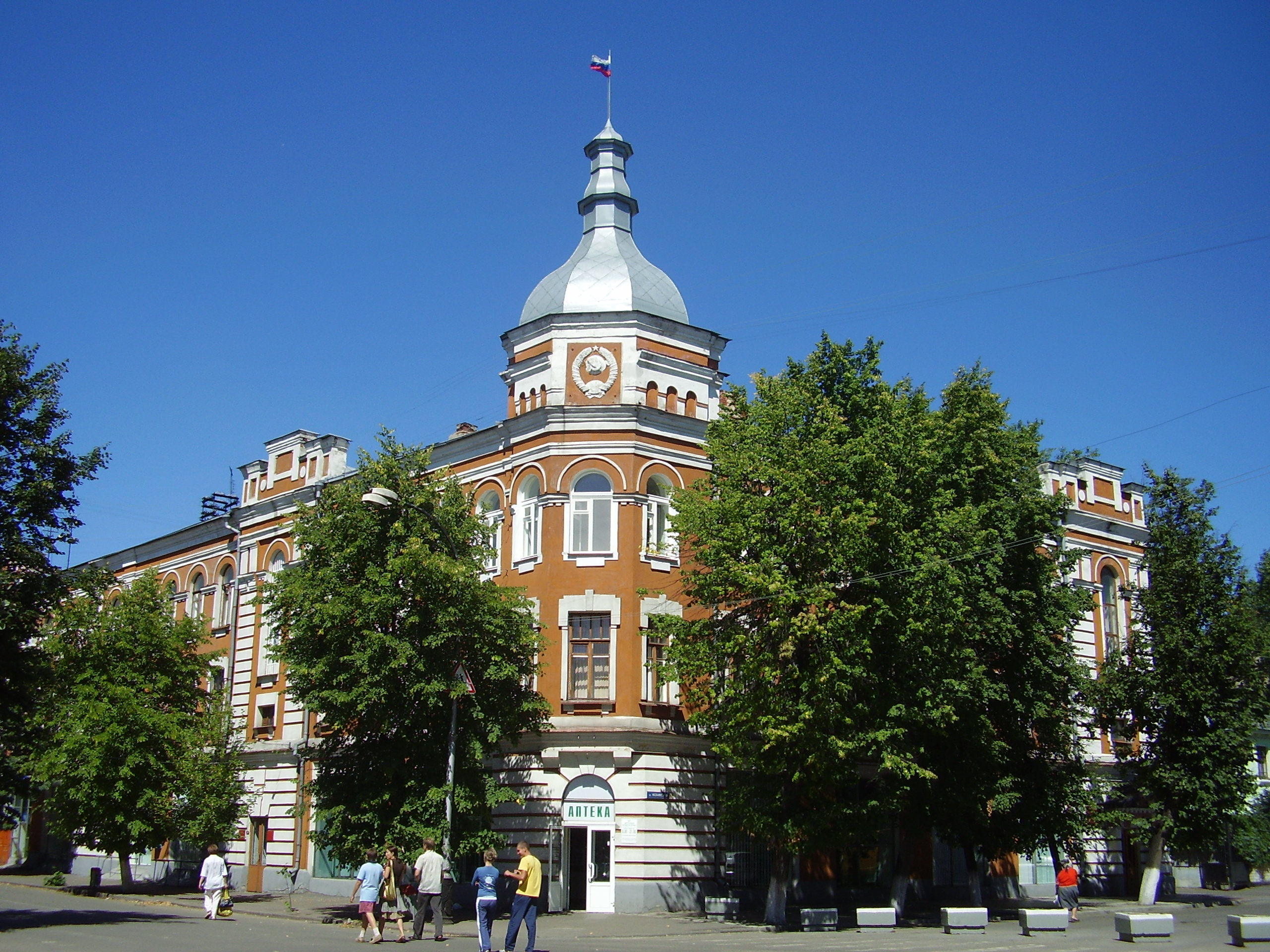 Мичуринск, здание городской администрации